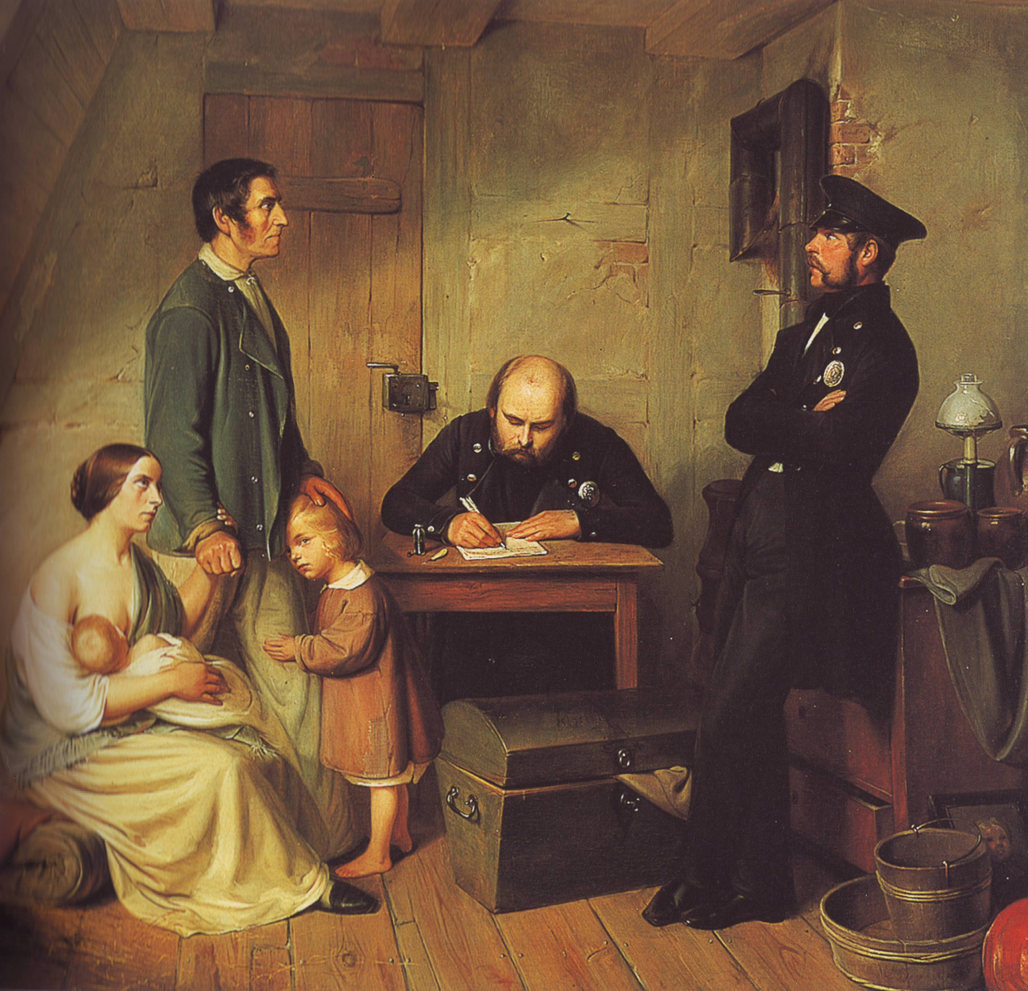 Öl auf Leinwand, Leopold Bendix, 1847. “Auspfändung”